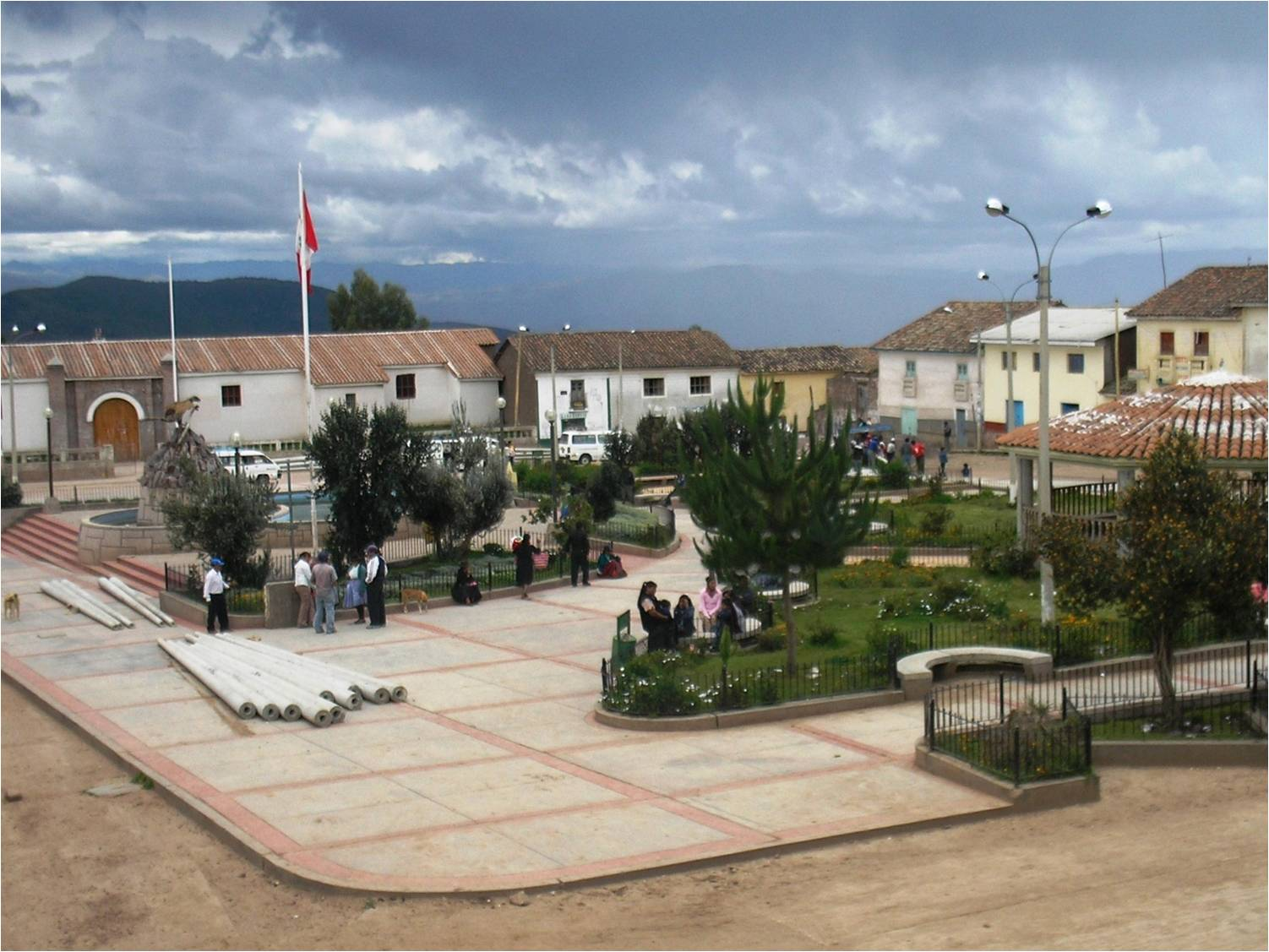 Parque Principal de Huamanguilla